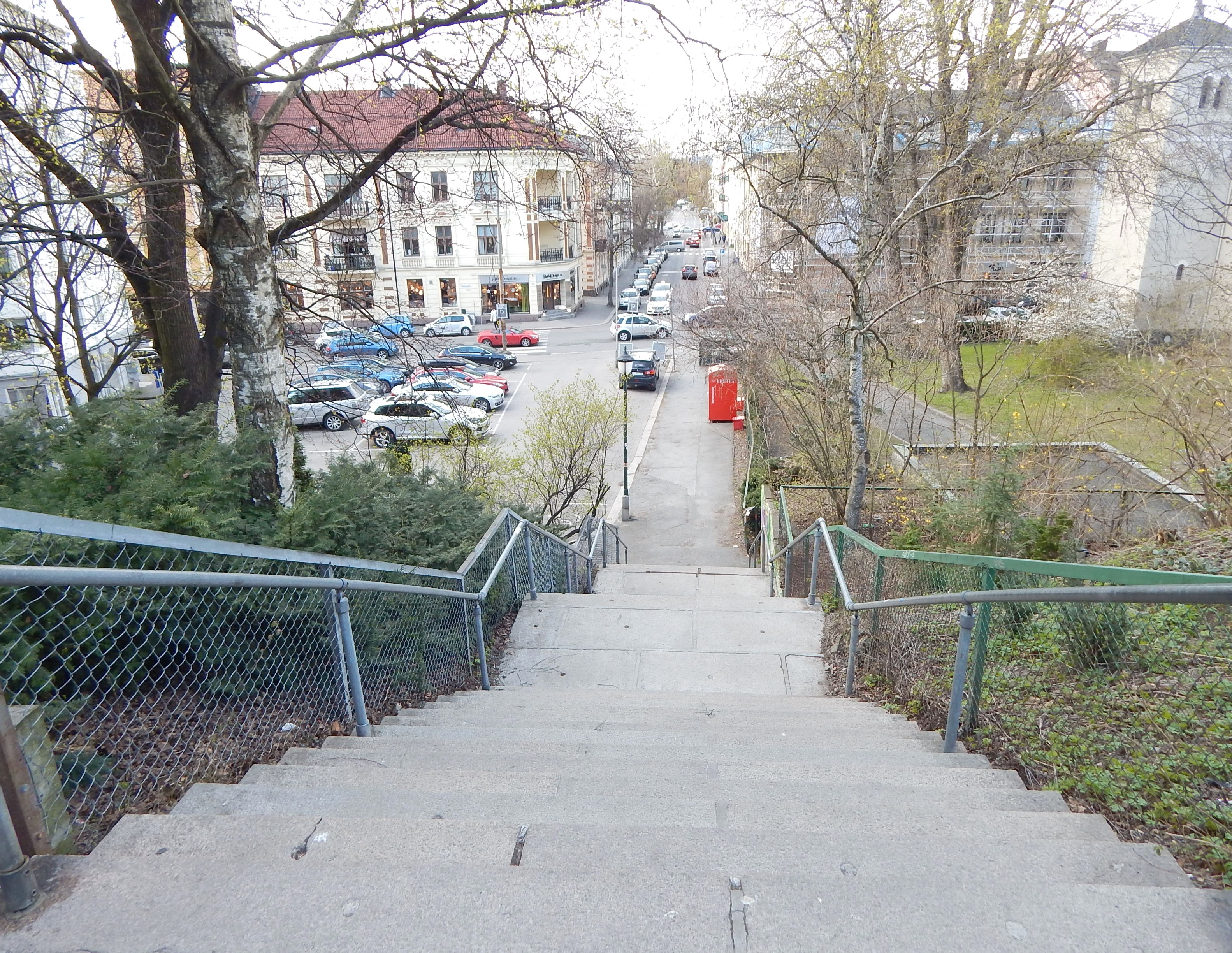 Trappeforbindelse fra Ole Fladagers gate mot Middelthuns gate og Neuberggata